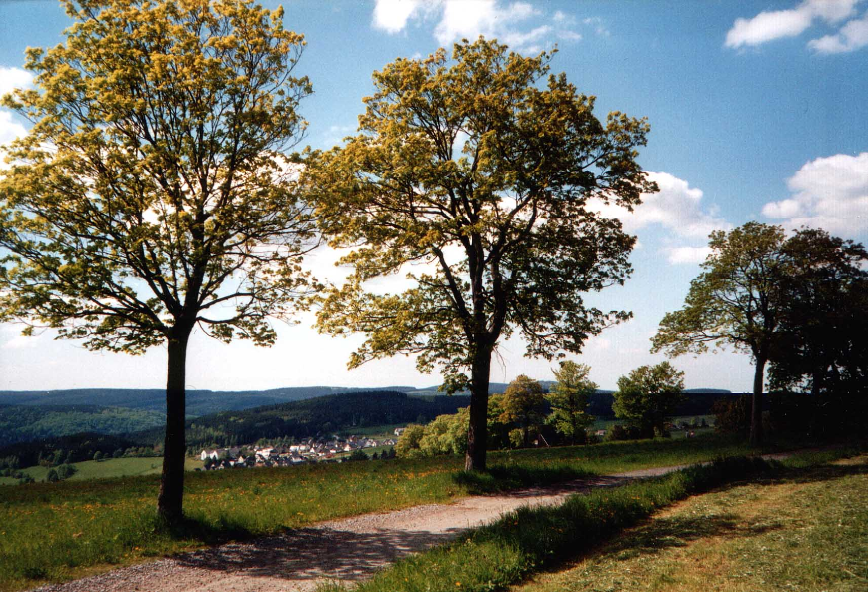 Blick von der Joachimsthaler Straße auf Breitenbrunn im Erzgebirge.